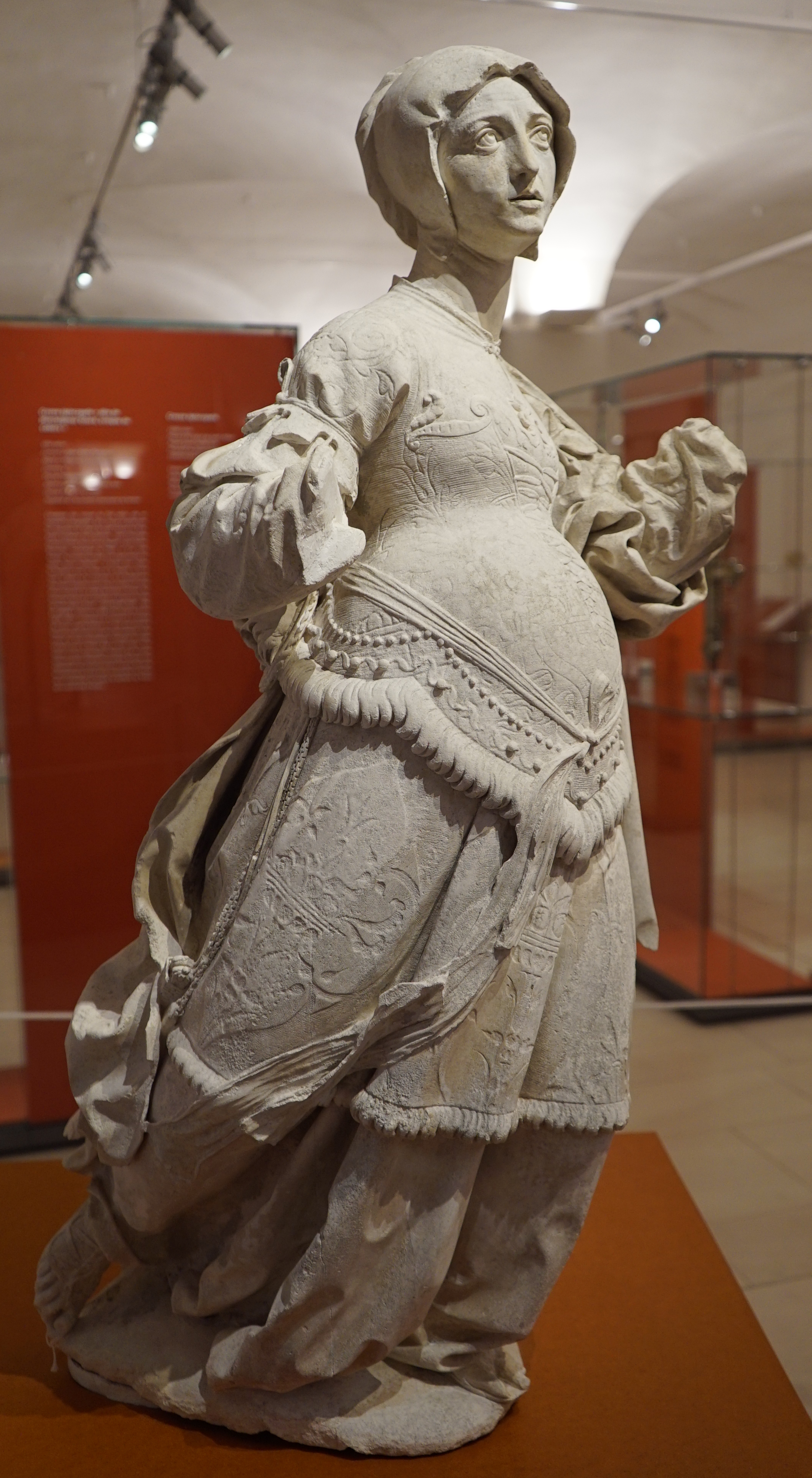 statue attribuée à Ligier Richier provenant d'un autel lateral de l'église st-Etienne et saisie par les Domaines en 1950, présenté au musée de st-Mihiel.